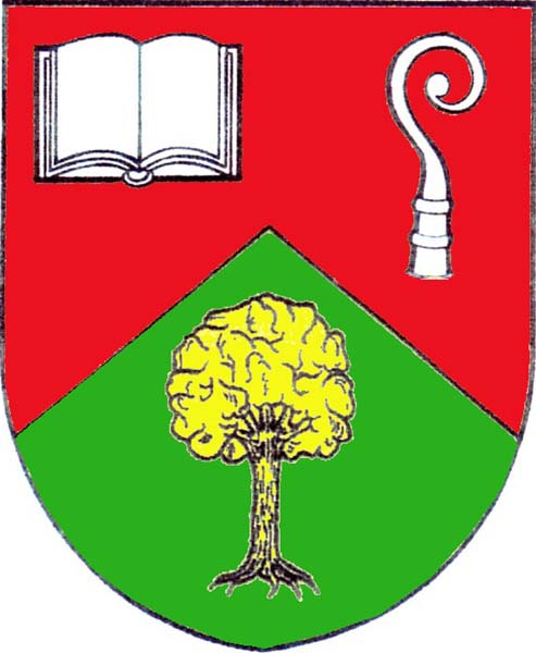 Znak obce Skryje v okrese Brno-venkov